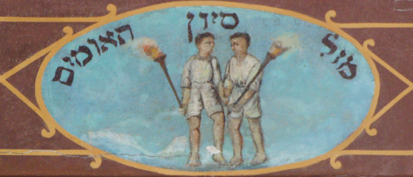 Znaki zodiaku na belkowaniu galerii dla kobiet synagogi Kupa w Krakowie